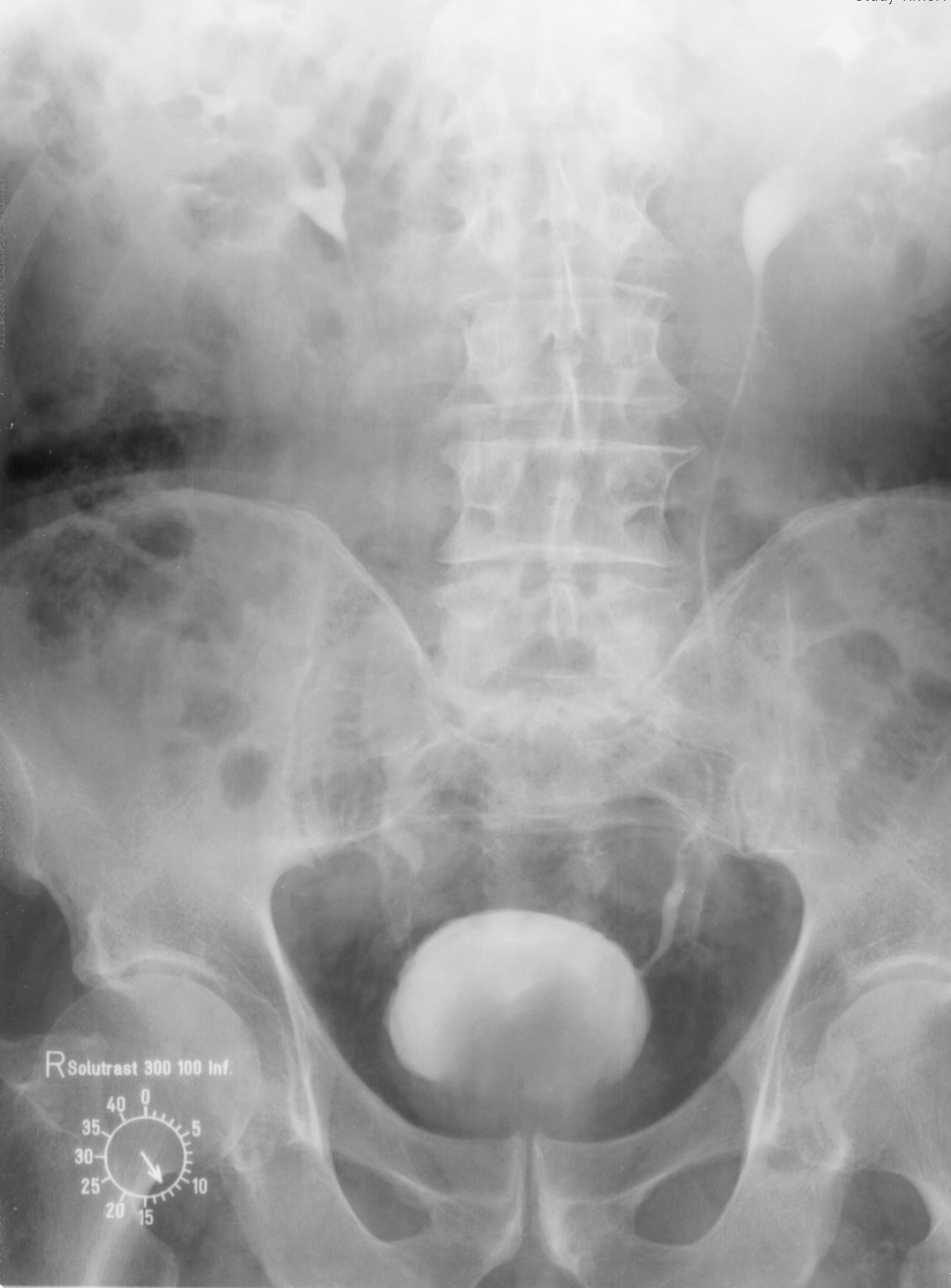 Röntgenaufnahme